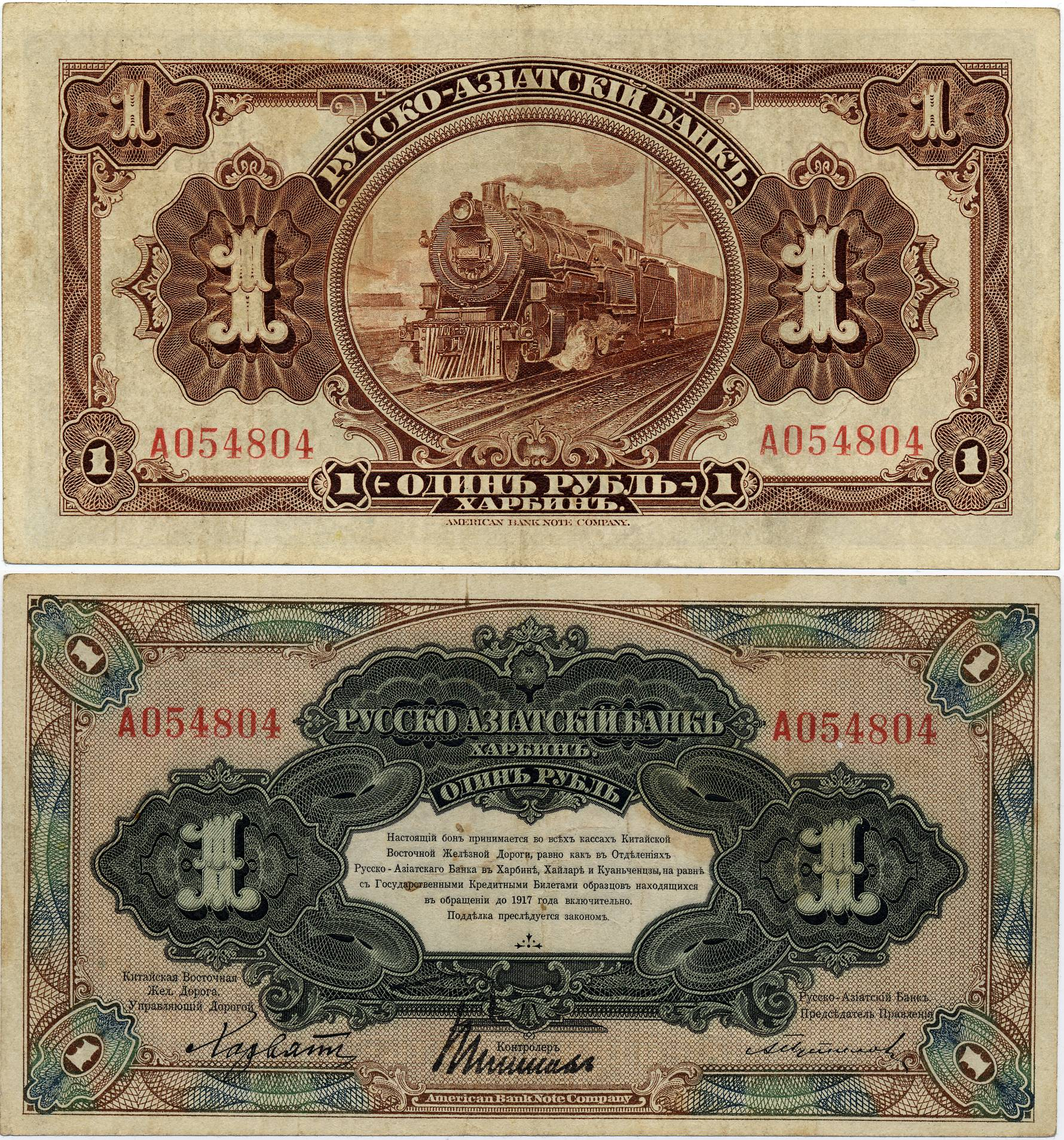 Харбинский один рубль Русско-Азиатского банка. Подпись Хорвата.